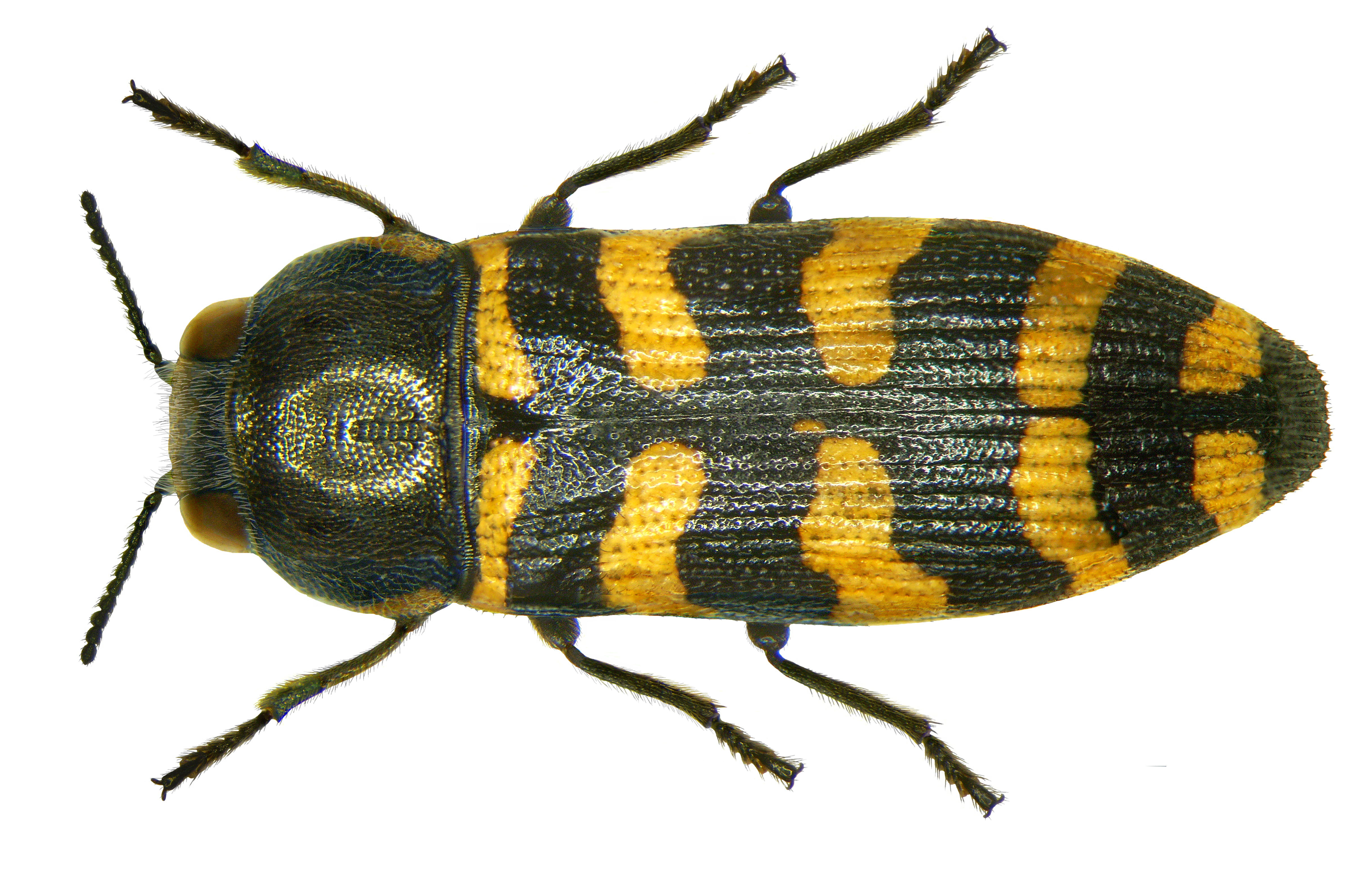 Familie: Buprestidae Grösse: 5,6 mm Fundort: Türkei, Prov. Mersin, Aydincik, 800 m leg. A.Skale, 2002; det. M.Niehuis, 2002 Foto: U.Schmidt, 2008